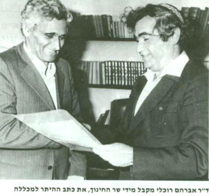 שסמינר לוינסקי היה בנווה צדק